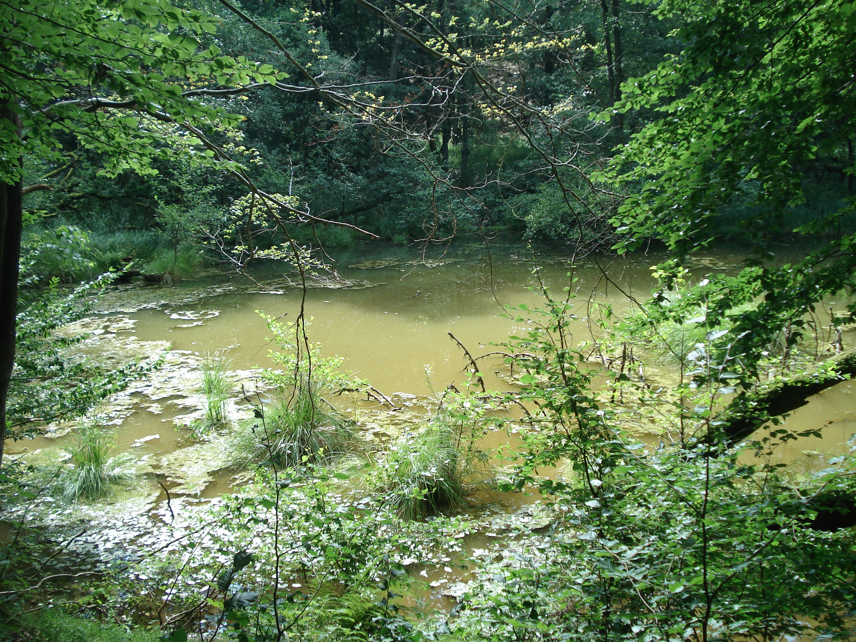 Das Teufelsloch bei Osterode